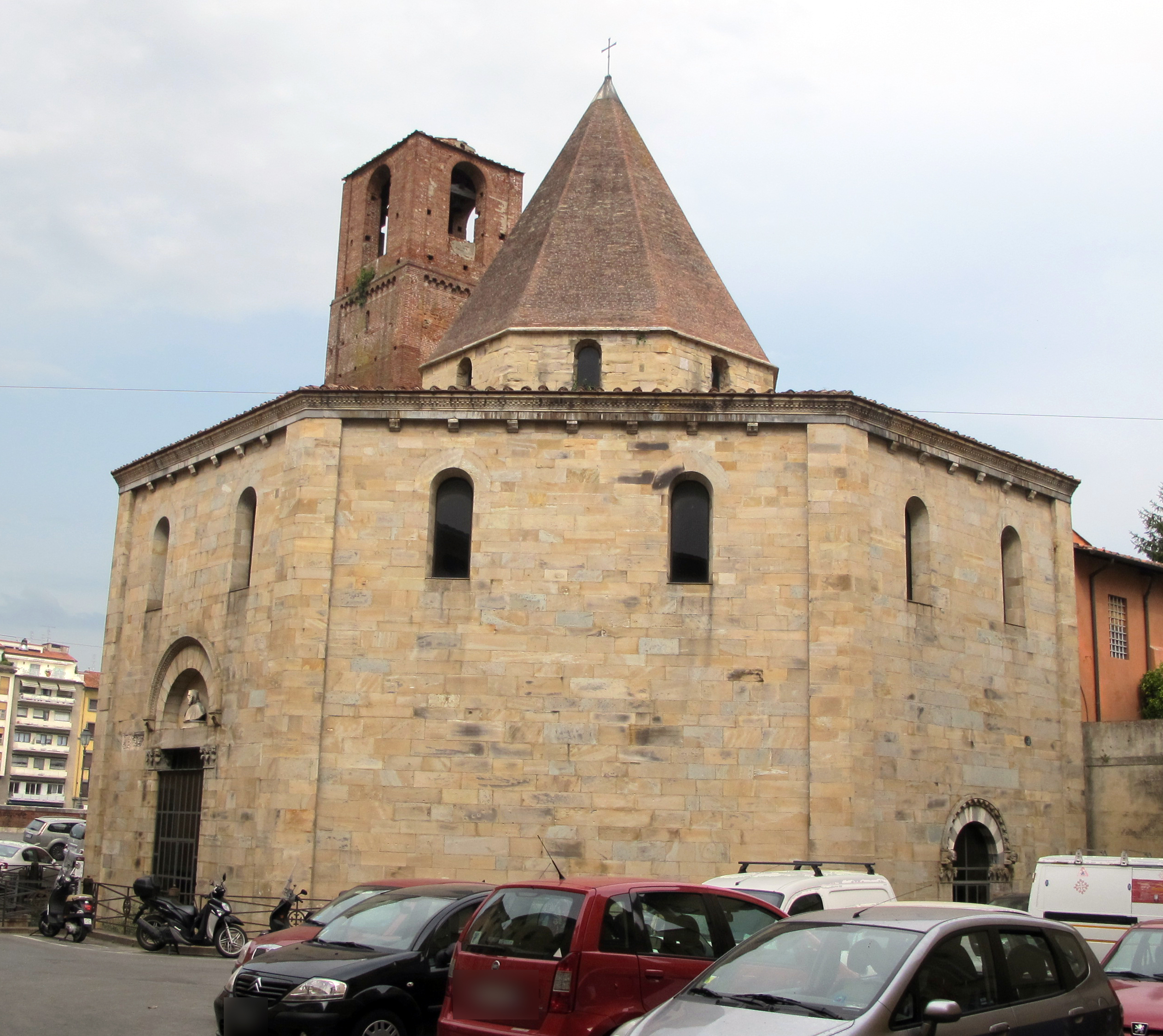 Pisa, Toscana